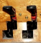 Harp pedals